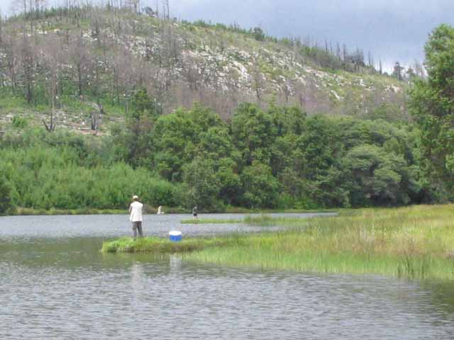 Њанга национални парк, Пецање пастрмки, Аутор Др. Влада Рајковић, објављено по експлицитном одобрењу аутора